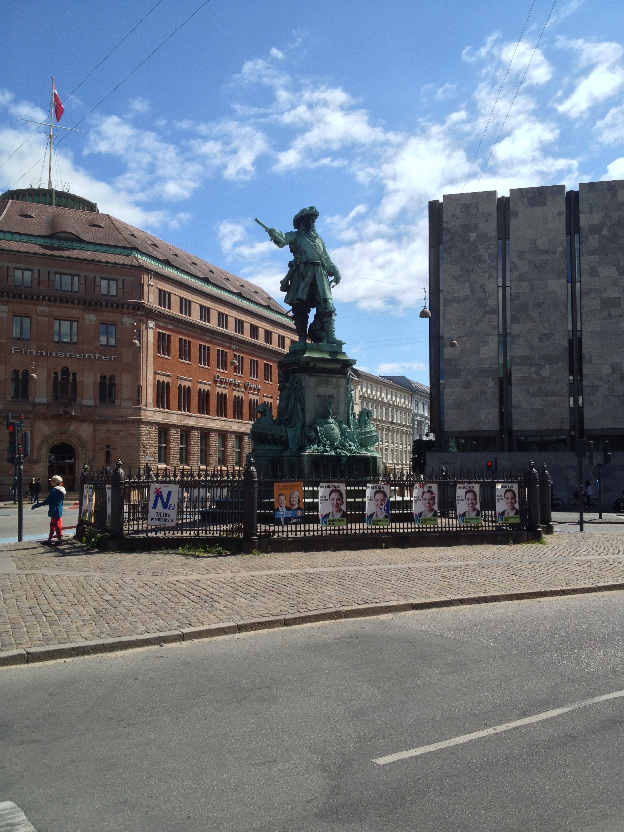 Niels Juel statue at Holmens Kanal in Copenhagen, Denmark